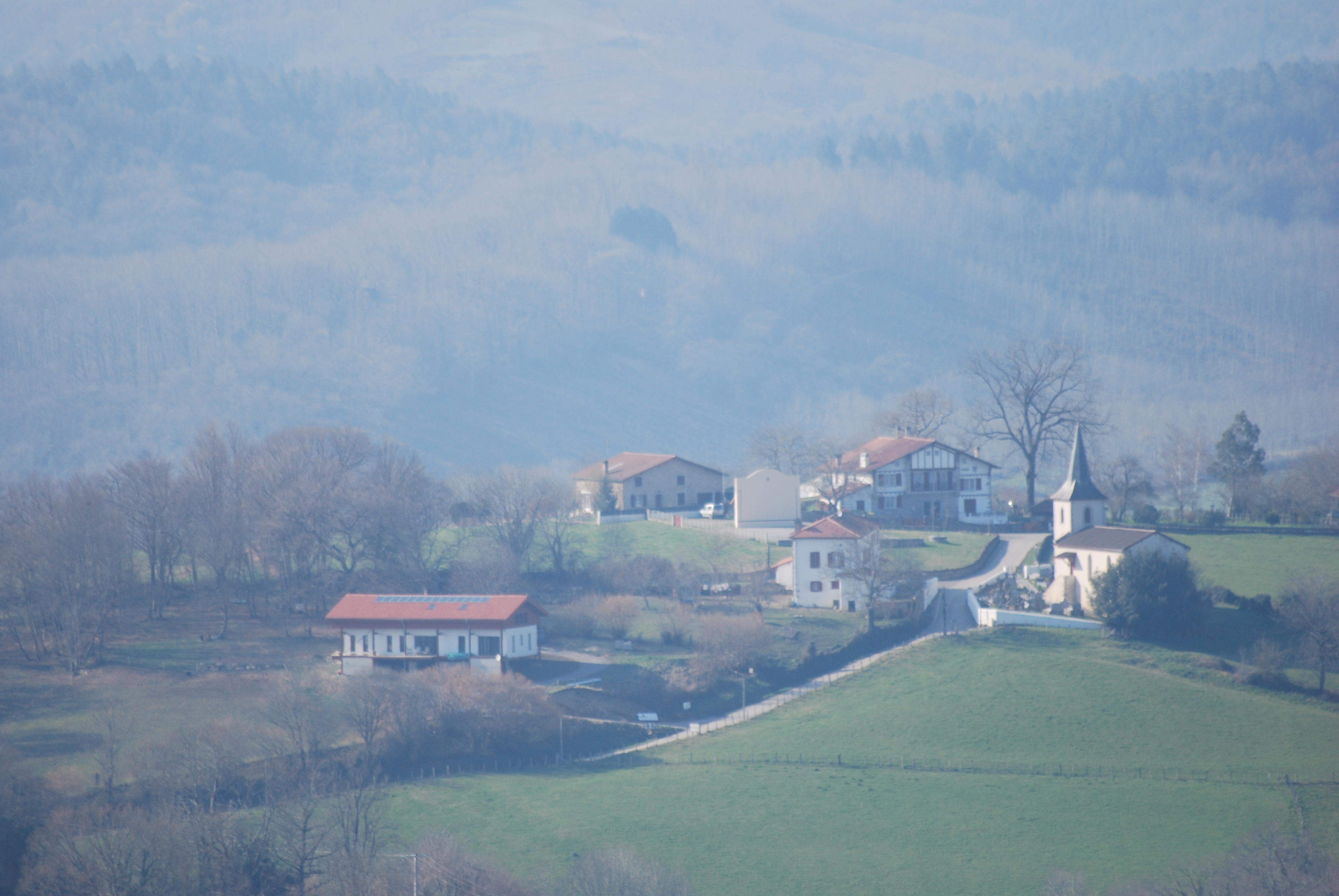 Vue du village d'Orsanco depuis la chapelle de Soyarza.